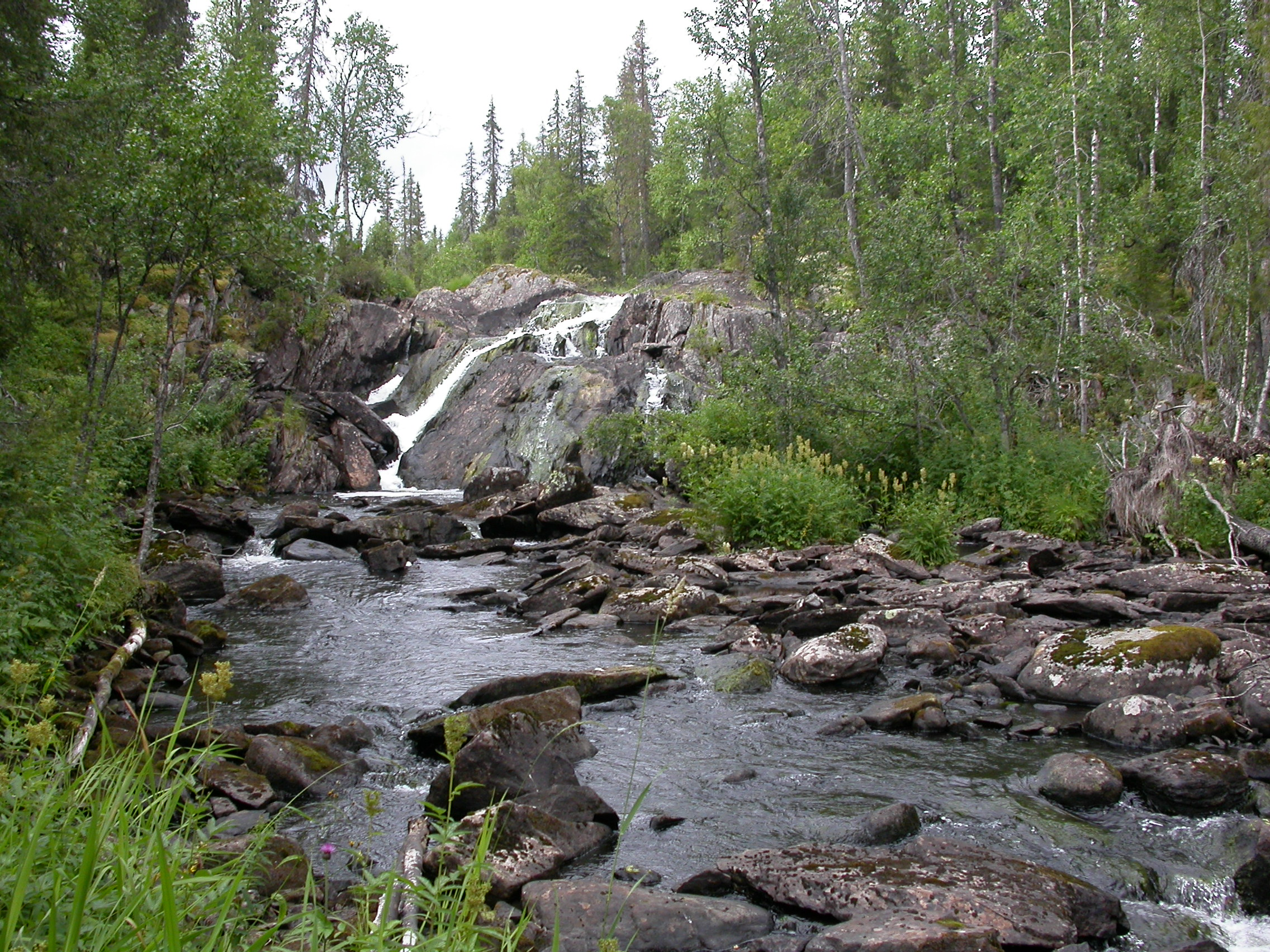 Муткайоки, водопад